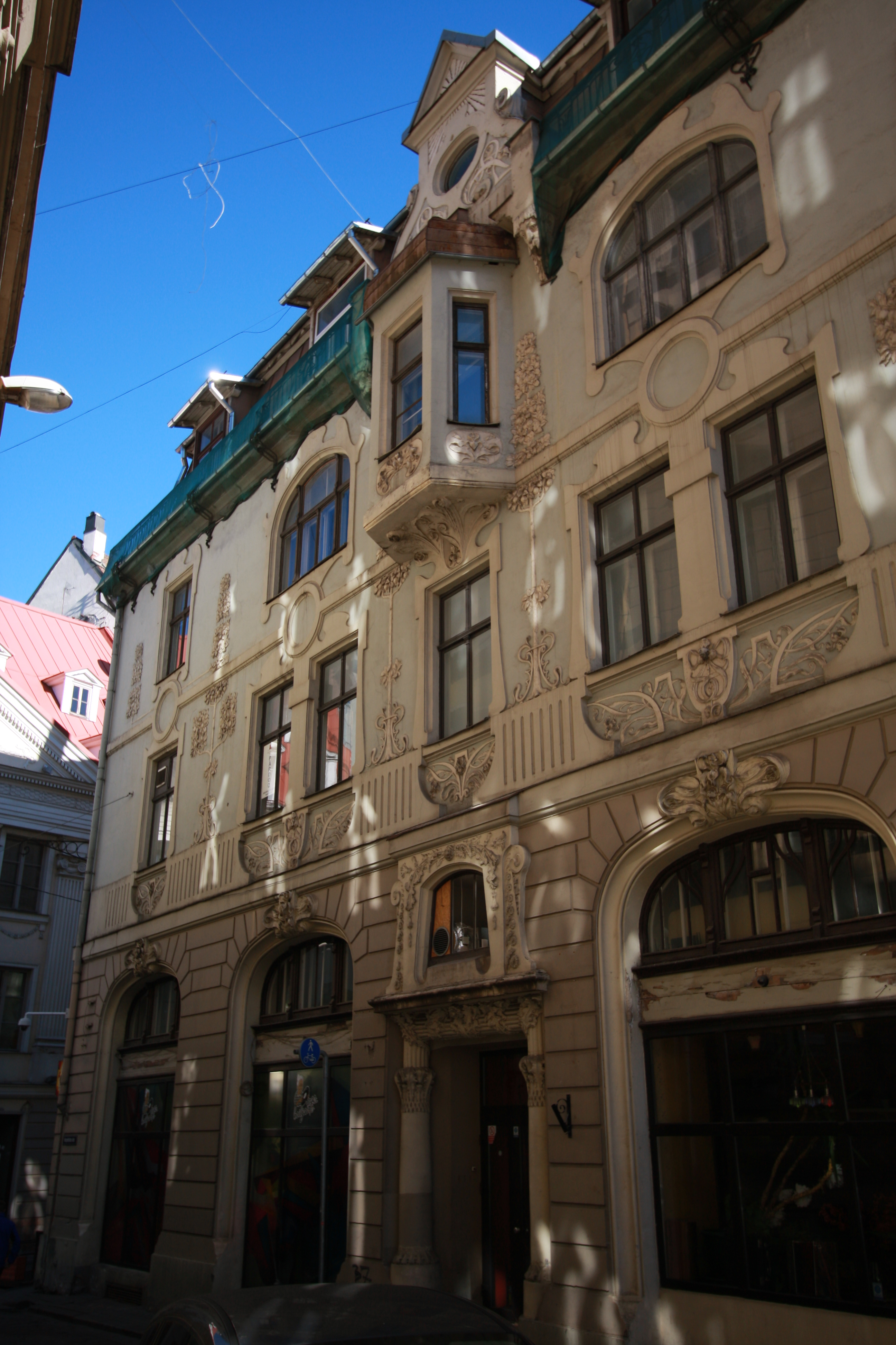 Dzīvojamo ēku komplekss, Rīga, Audēju iela 7; Audēju iela 9; Audēju iela 11